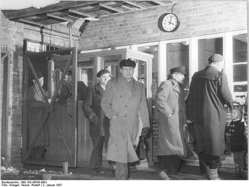 Wildau, VEB "Heinrich Rau", Schichtwechsel Zentralbild Krueger Hesse 2.1.57 45 Stunden-Woche im VEB Schwermaschinenbau "Heinrich Rau" eingeführt Im volkseigenen Schwermaschinenbau "Heinrich Rau" in Wildau wurde am 2.1.1957, wie in weiteren 11 Betrieben des volkseigenen Maschinenbaus, die 45-Stunden-Woche eingeführt. UBz: Das erste Mal verlassen die Werktätigen dieser Schicht um 16.00.Uhr den Betrieb.